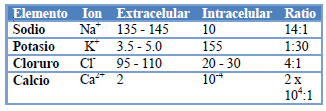 Concentraciones ionicasintra- y extracelulares (mmol/L) del Potencial de Acción Cardiaco